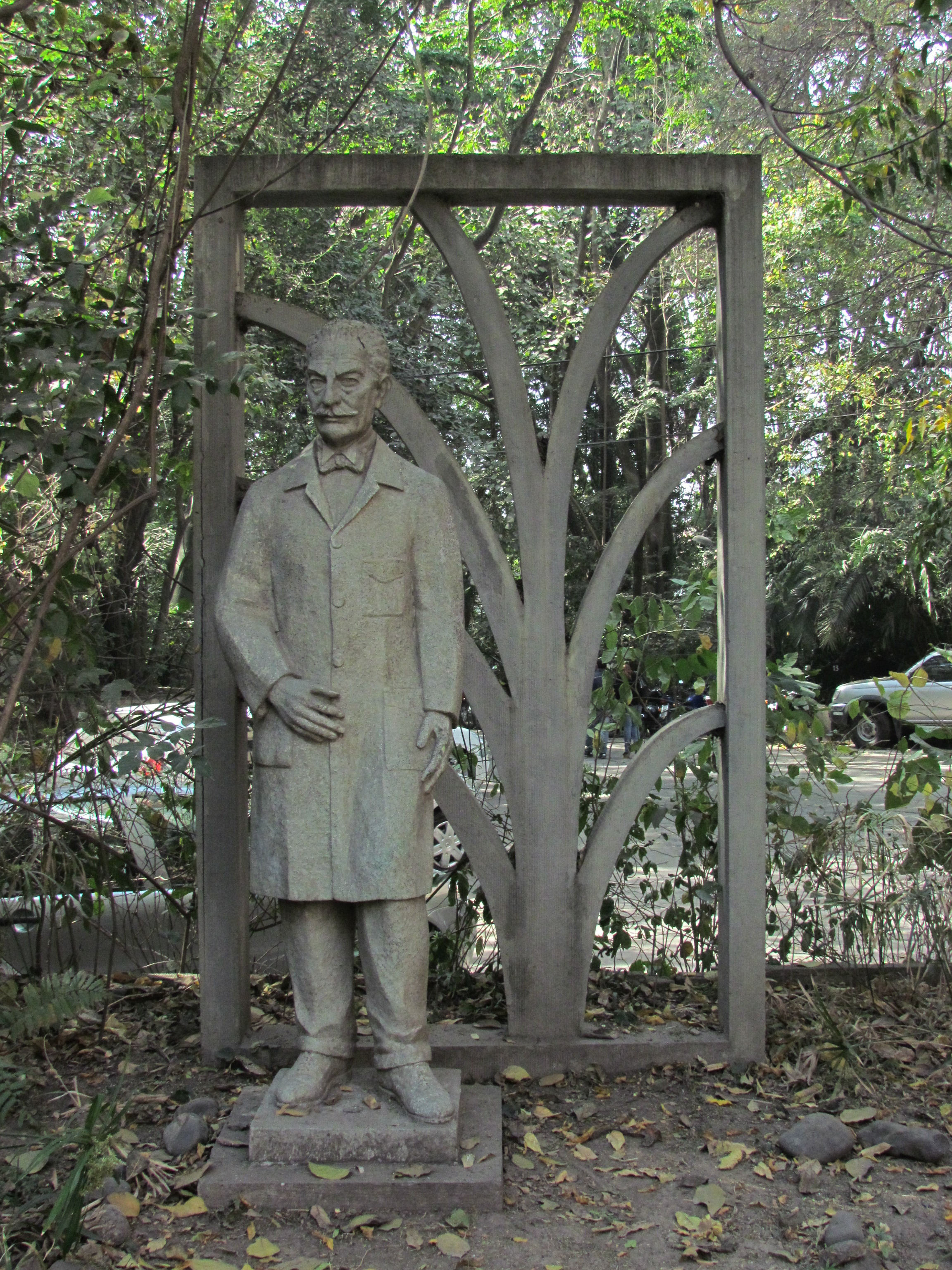 Monumento a Miguel Lillo, en el Museo Lillo